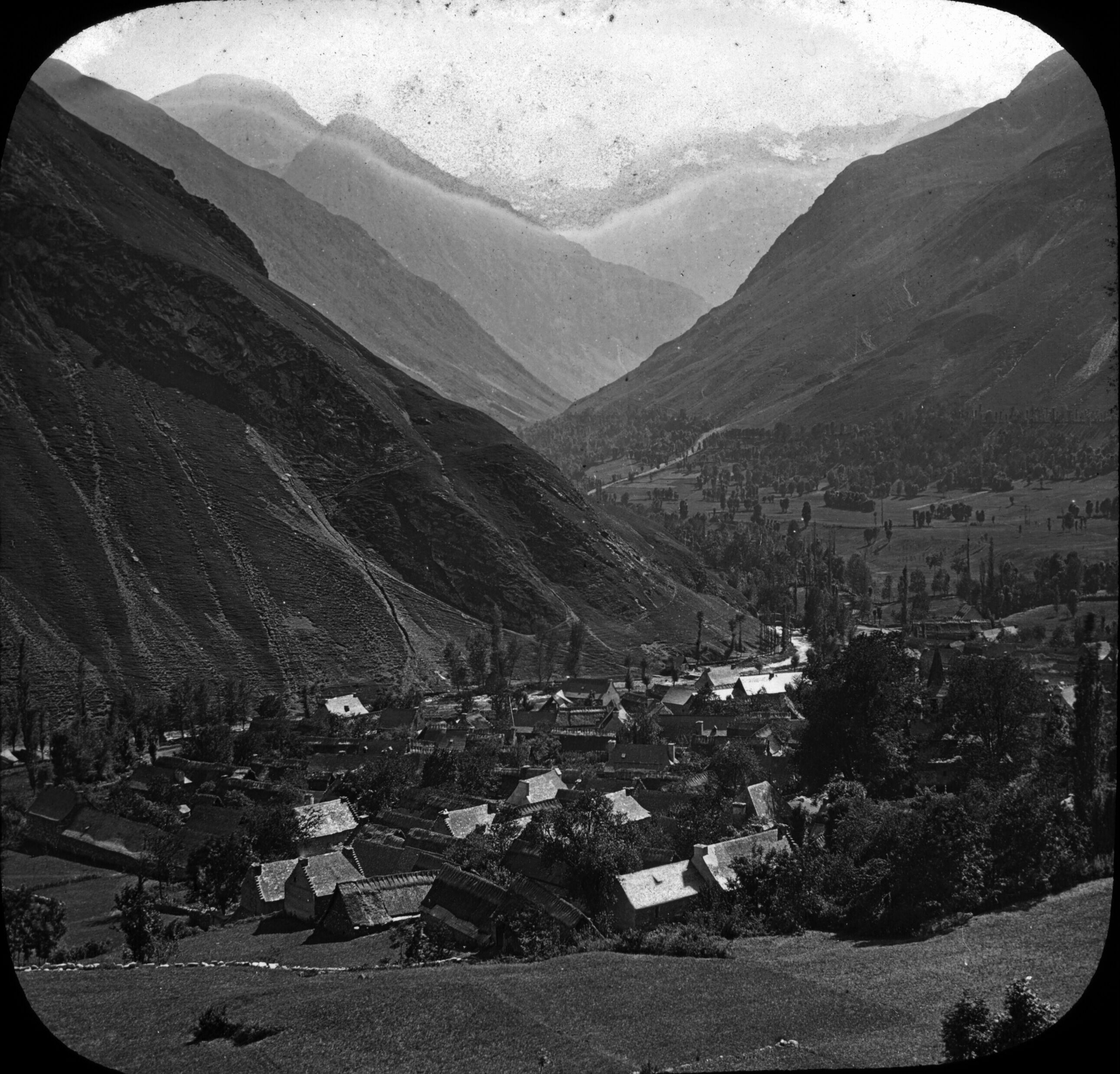 Fonds Trutat - Photographie ancienne Cote : TRU C 283 Localisation : Fonds ancien Original non communicable Titre : Village et vallée d'Oô Auteur : Trutat, Eugène Rôle de l’auteur : Photographe Lieu de création : Bagnères-de-Luchon (Haute-Garonne ; canton) Date de création : : 1859-1910 [entre] Mesures : 10 x 9 cm Mot(s)-clé(s) : -- Vallée -- Montagne -- Pic (montagne) -- Végétation -- Prairie -- Arbre -- Village -- Oô (France ; haute-vallée) -- Oô (Haute-Garonne) -- Bagnères-de-Luchon (Haute-Garonne ; canton) -- Luchonnais, Massif du (France) -- 19e siècle, 2e moitié -- 20e siècle, 1e quart Médium : Photographies -- Noir et blanc -- Positifs au collodion sur plaque de verre -- Paysages de montagne -- Vues de ville Bibliothèque de Toulouse. Domaine public